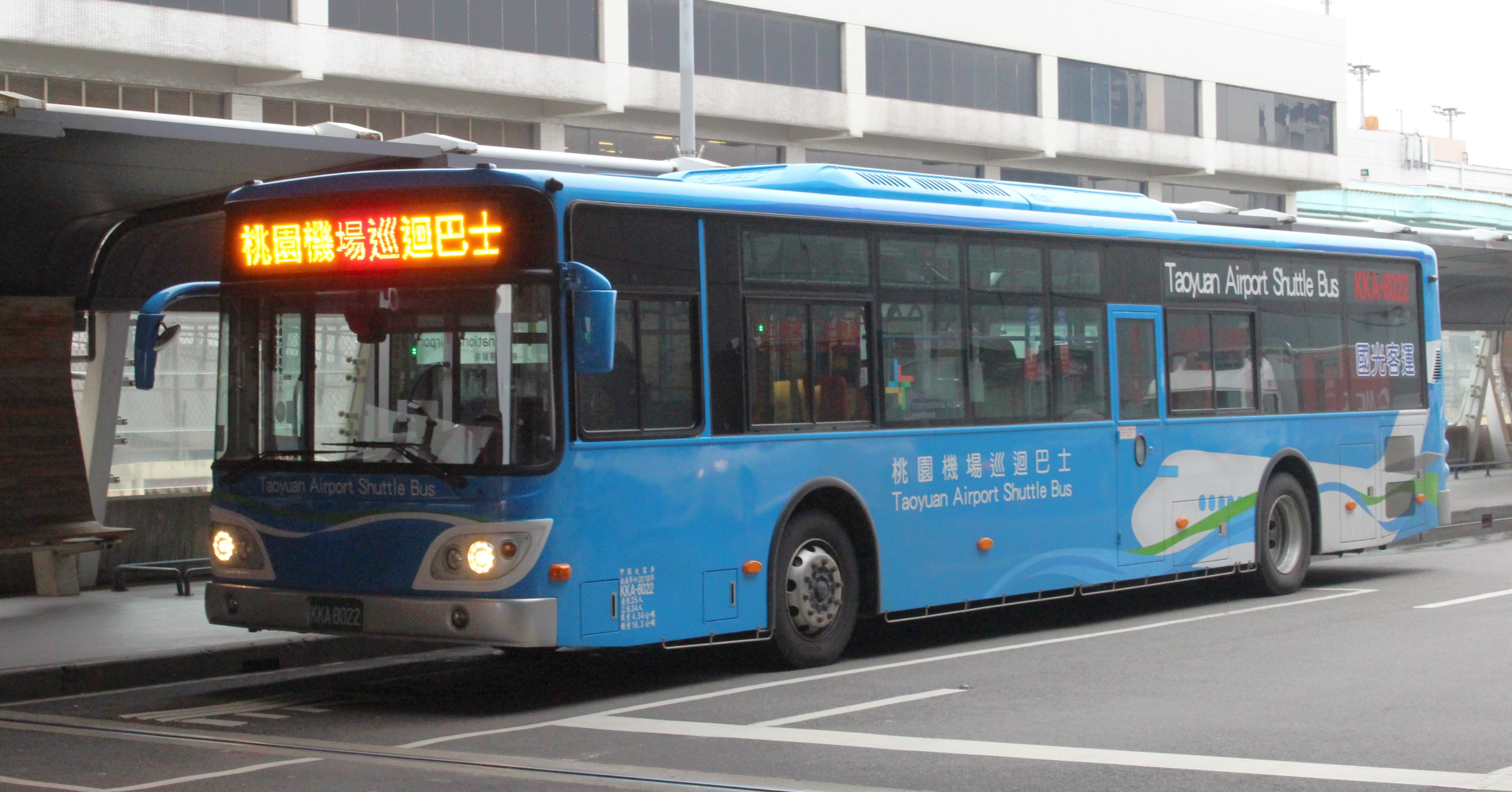 國光客運2018 成運 Master MB120NS KKA-8022 桃園機場巡迴接駁巴士